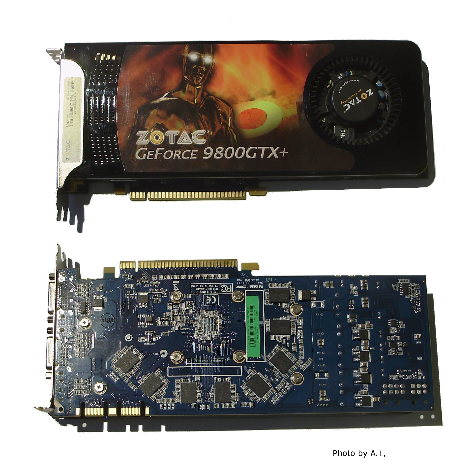 Zotac Geforce 9800GTX+ Ober- und Unterseite